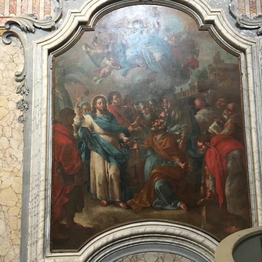 Dipinto di Domenico Carella raffigurante la consegna delle chiavi a San Pietro. Si trova a sinistra dell'altare maggiore della basilica minore del Santissimo Rosario (chiesa matrice di Francavilla Fontana) ed è stato fotografato dal coro al di sopra dell'altare.